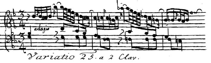 Beginn der 25. Variation aus den "Goldberg-Variationen"" BWV 988